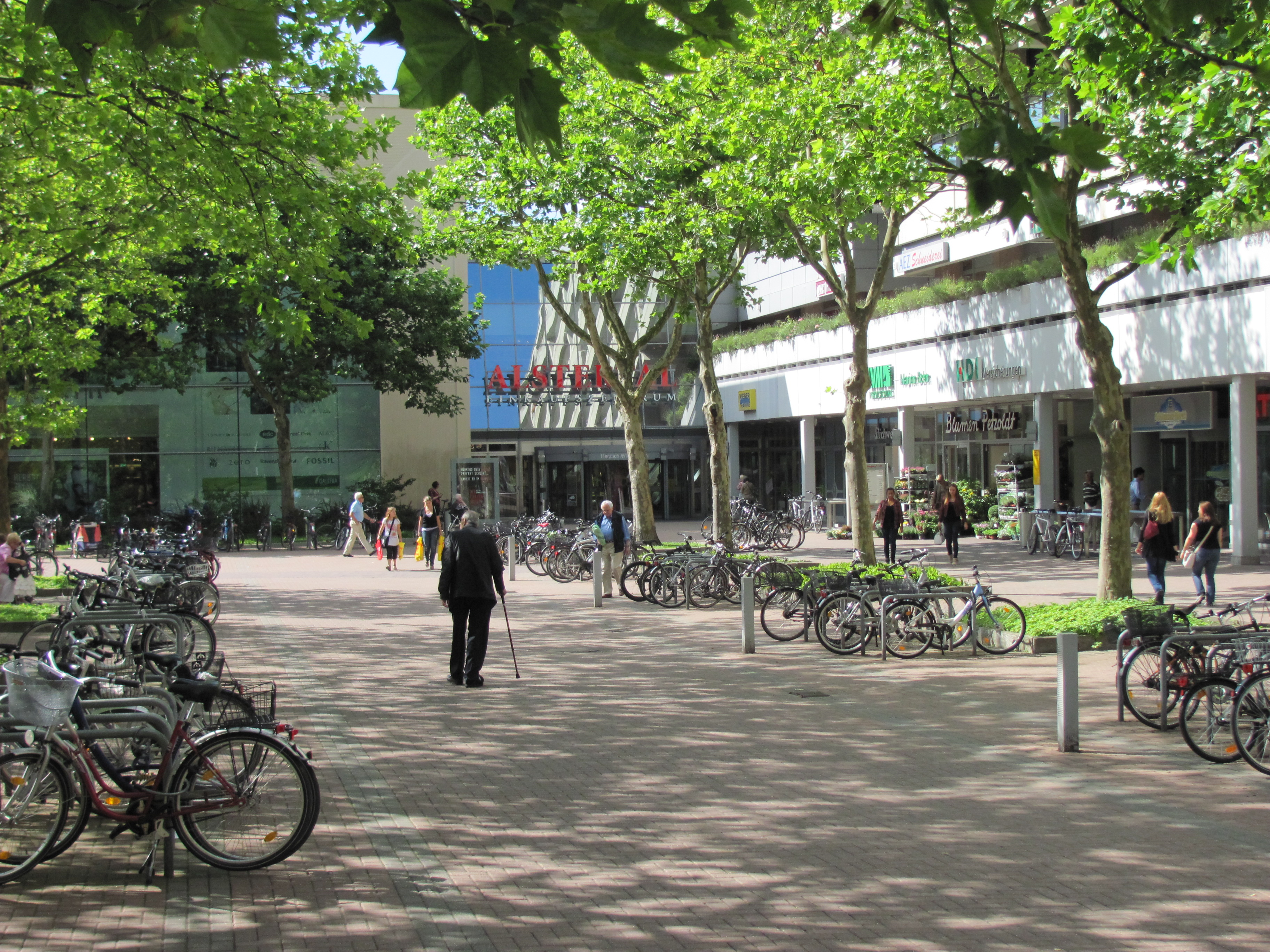 Eingang des Alstertal-Einkaufszentrums in Hamburg-Poppenbüttel aus Richtung S-Bahnhof